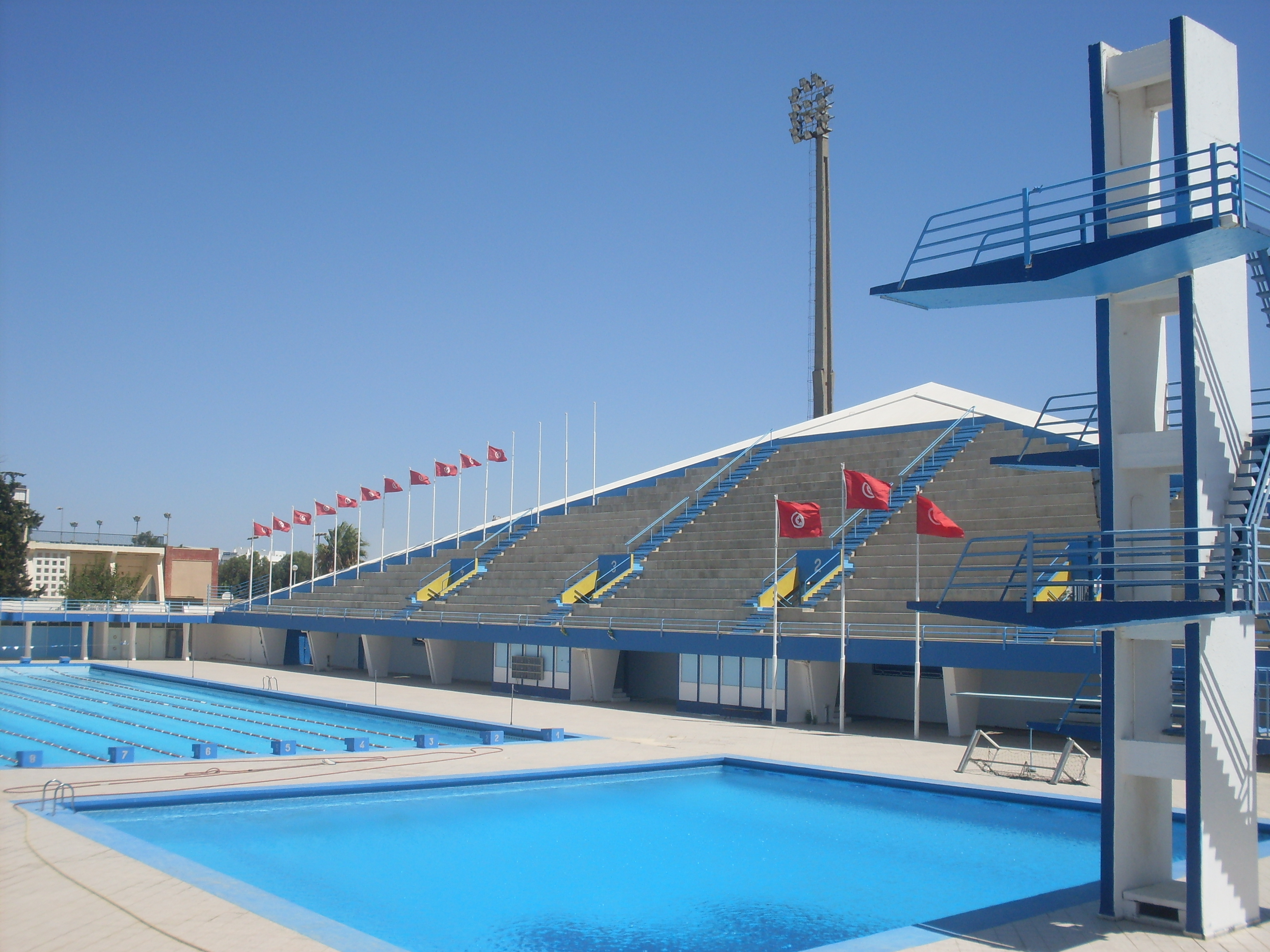 Tunis, Piscine Olympique d'el Menzah